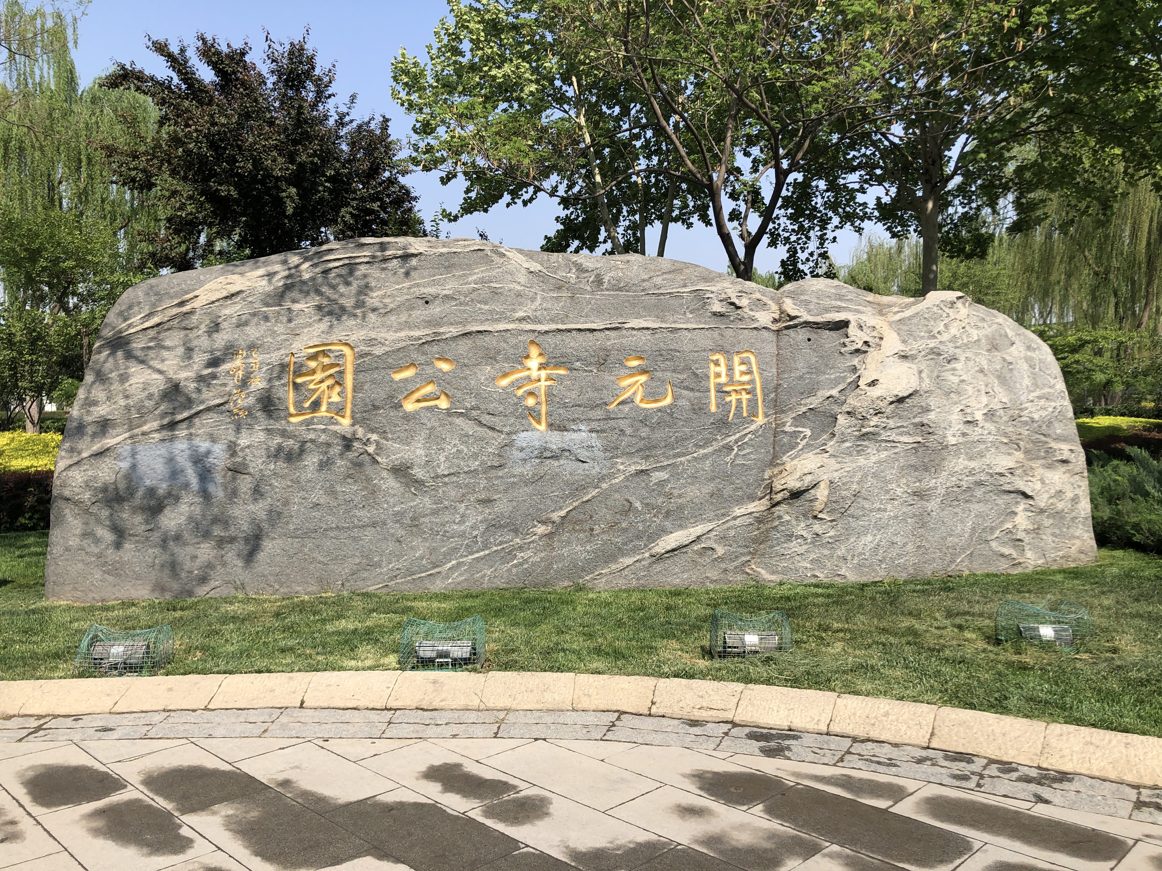 中文（中国大陆）: 邢台开元寺公园石刻